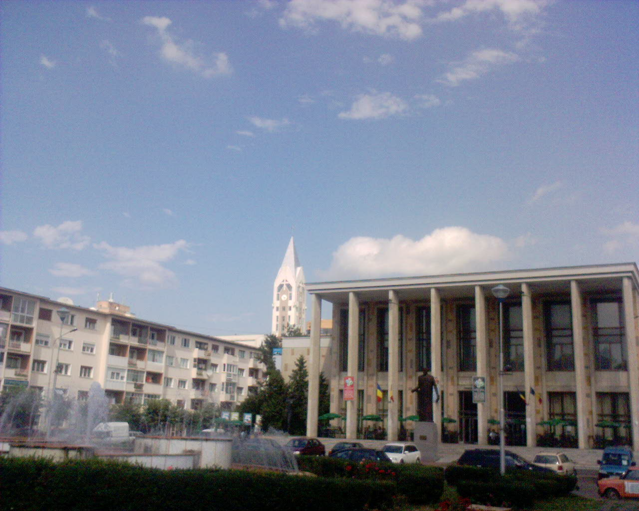 Bacau City Center (Romania), Culture House